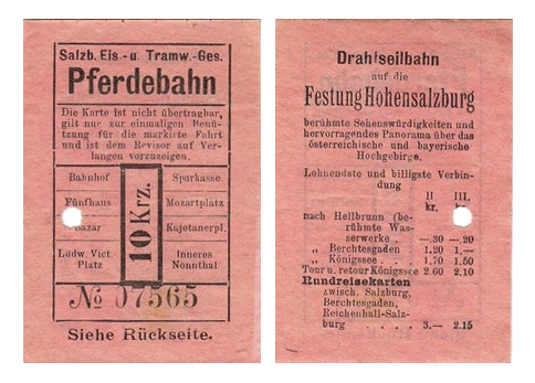 Fahrschein der Salzburger Pferdebahn